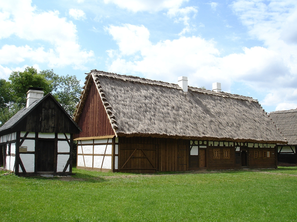 Museum des Oppelner Dorfes - Doppelhaus aus dem 18. Jahrhundert im Freilichtmuseum.